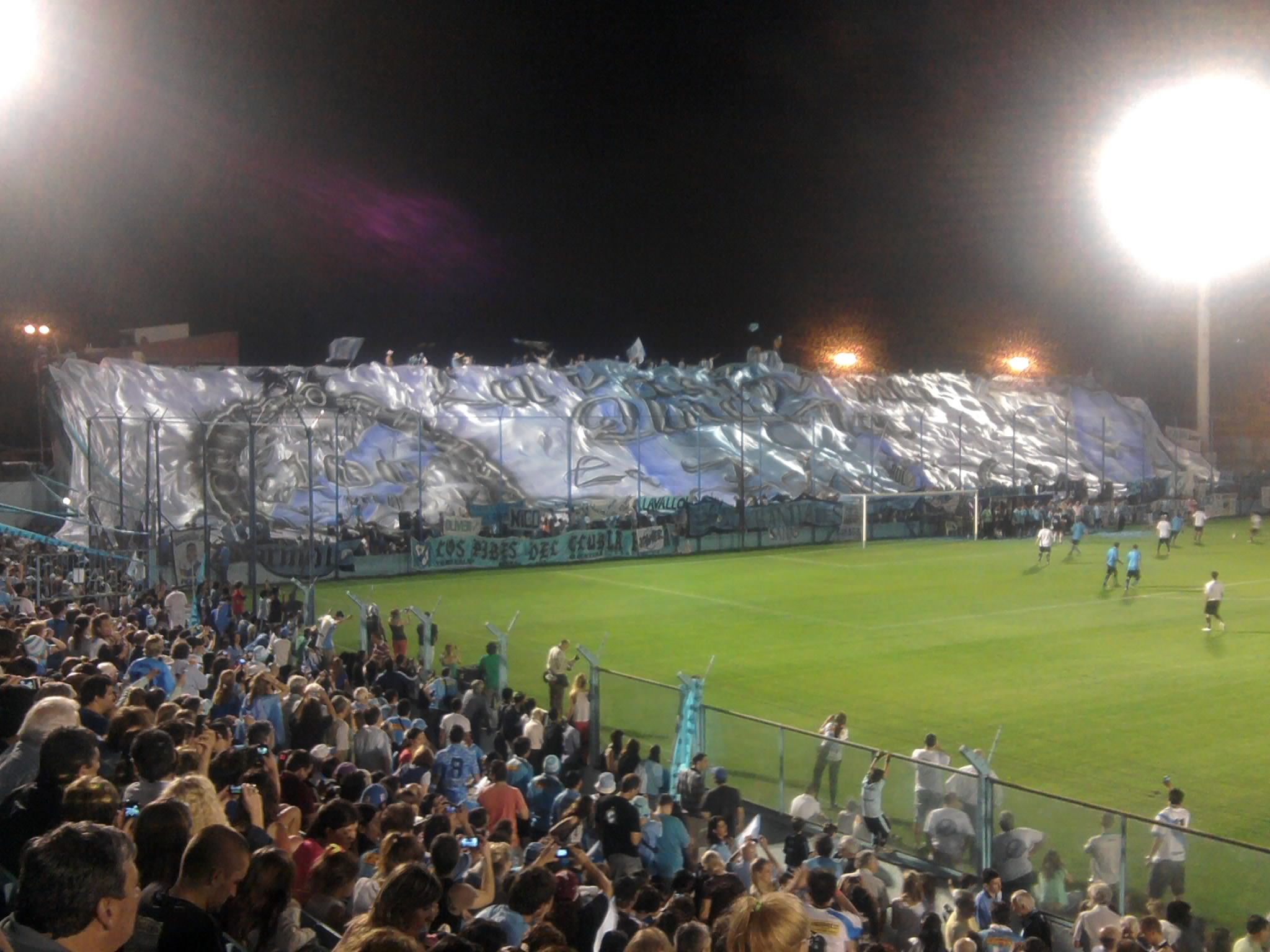 Tribuna Enrique Gilardoni en los festejos por el aniversario 100°